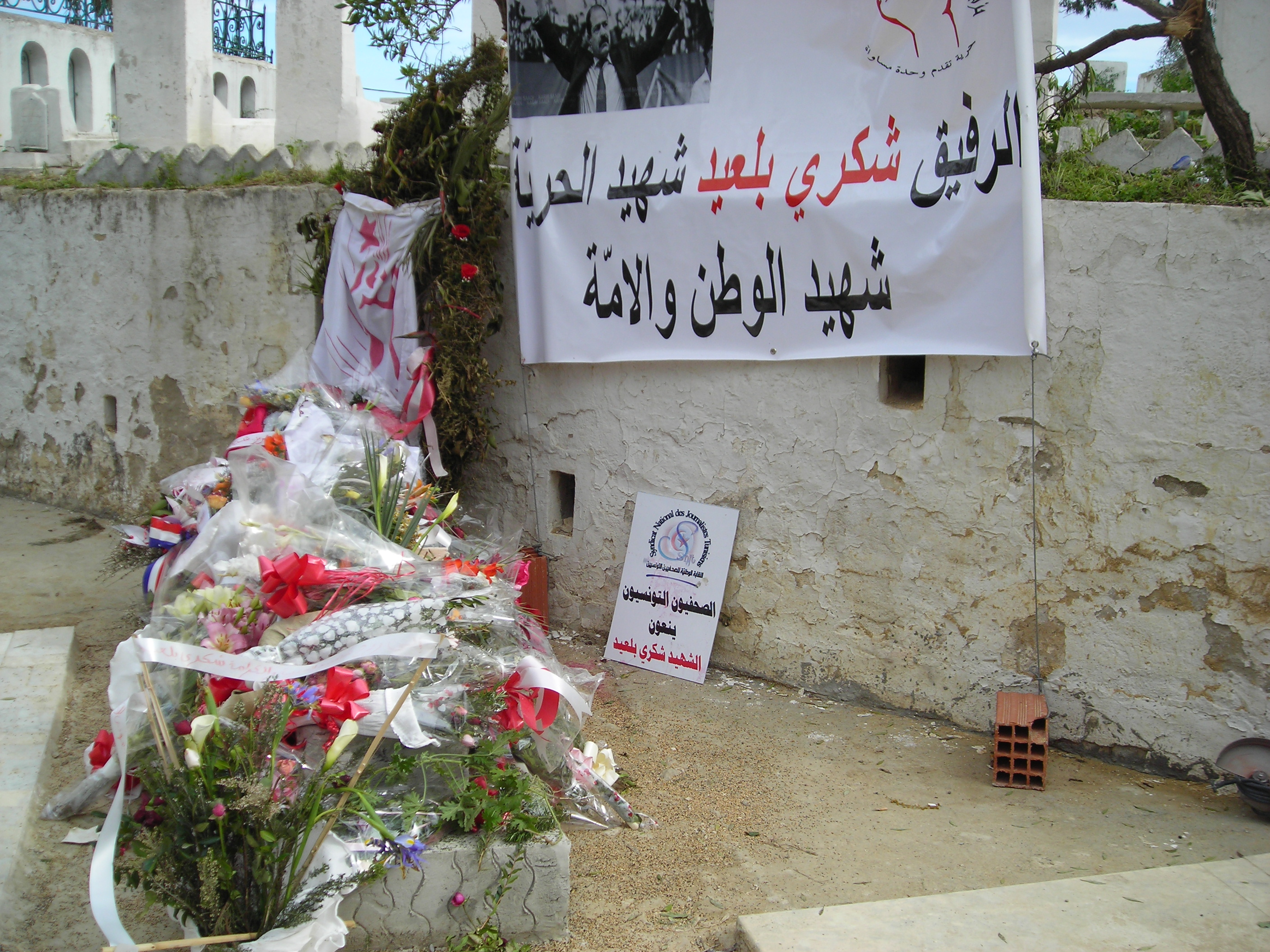 Tombe de Chokri Belaid